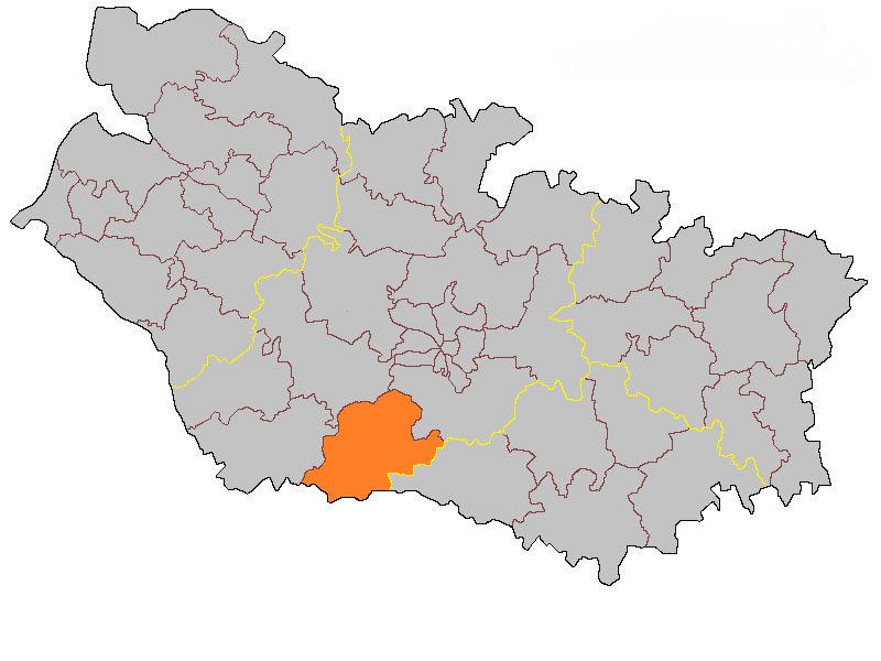 Кантон Конти на карте департамента Сомма